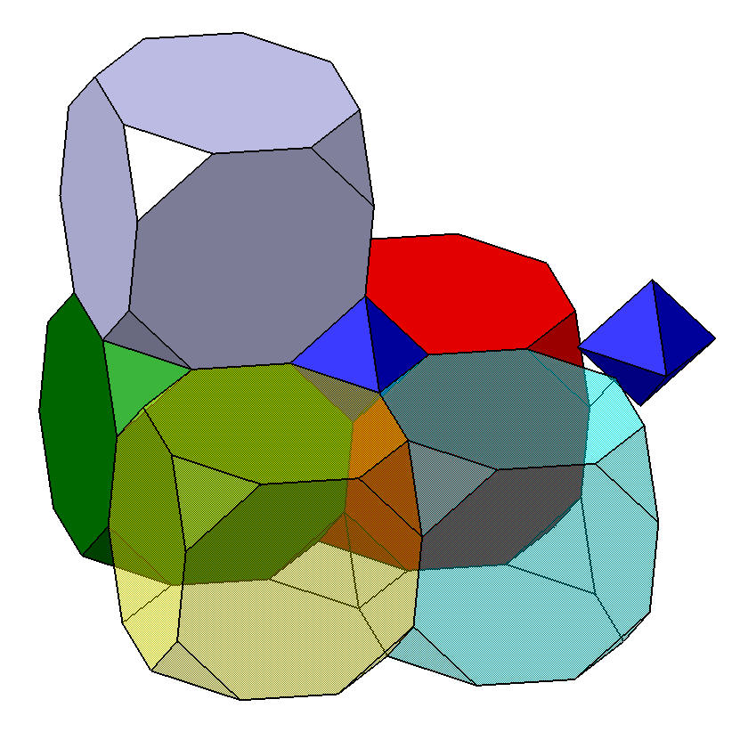 Parkettierung des Raums mittels Hexaederstumpfen und Oktaedern